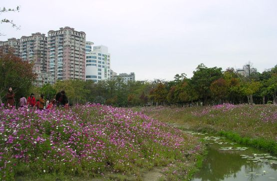 巴克禮紀念公園 Bân-lâm-gú: Pa-khik-lé kí-liām-kong-hn̂g